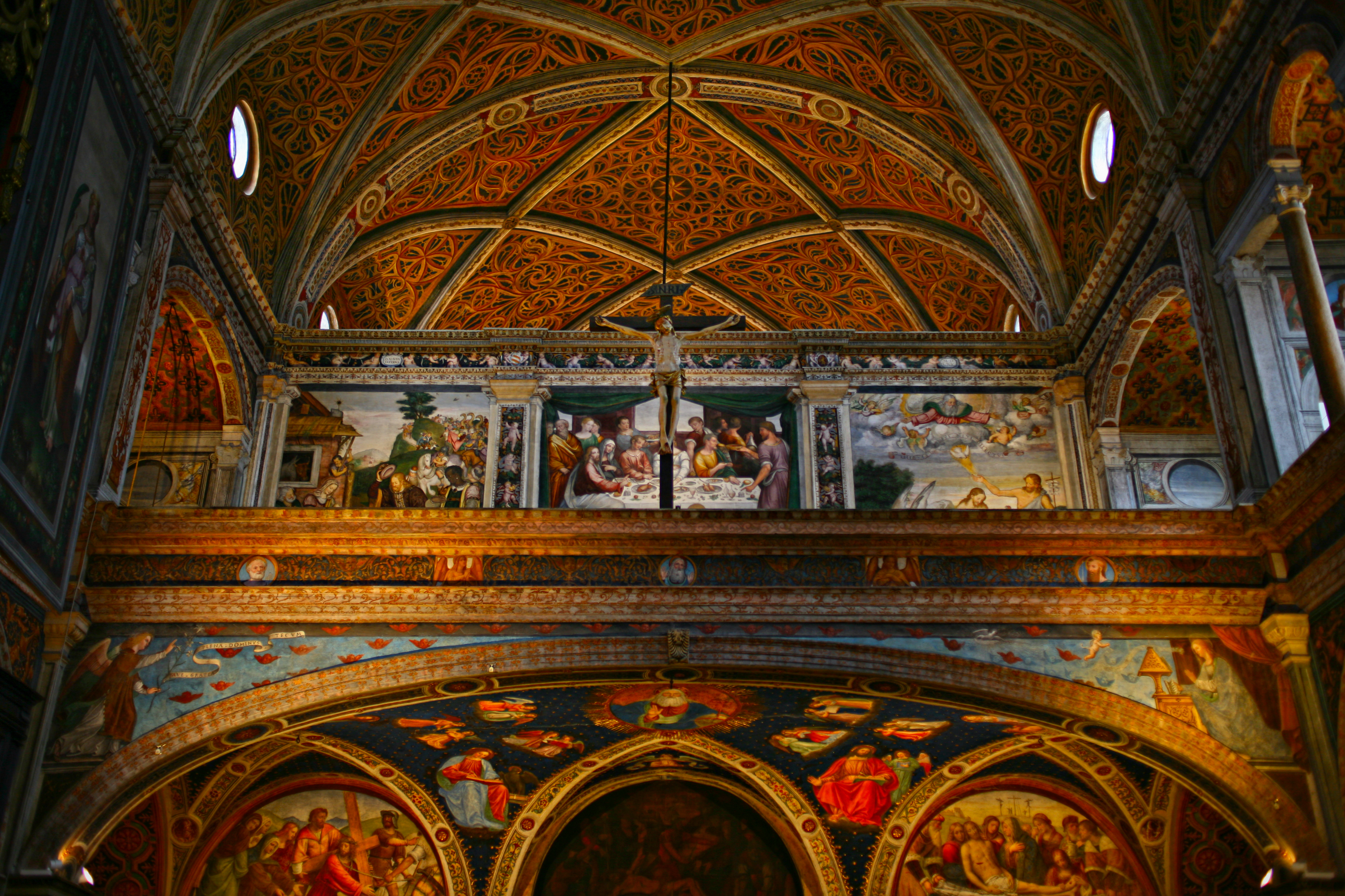 San Maurizio al Monastero Maggiore (Milano) Coro3